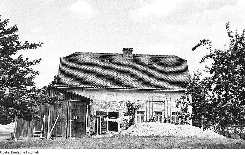 Original image description from the Deutsche Fotothek Beiersdorf. Ehem. Hadermühle, Wohnhaus